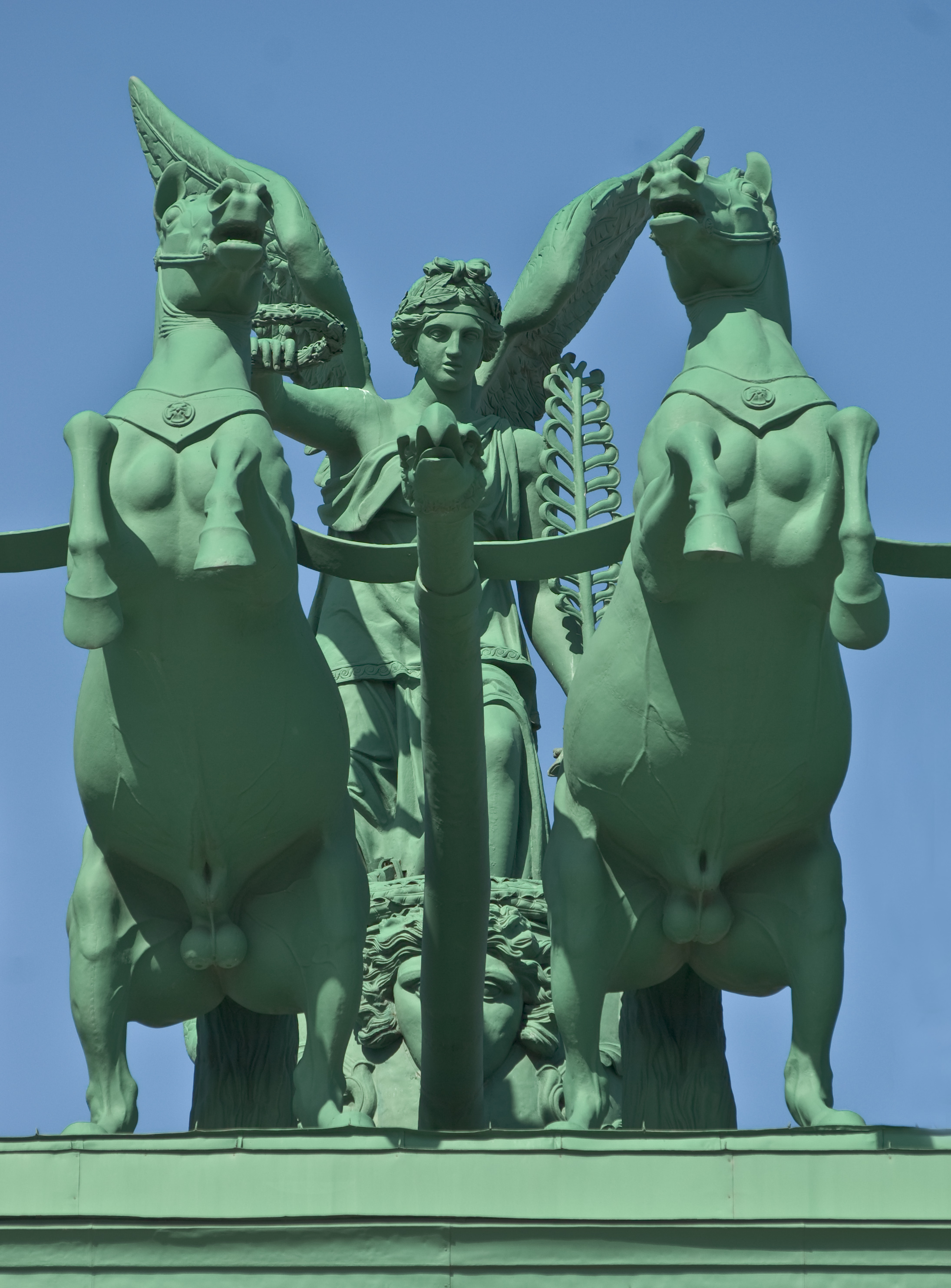 Центральный фрагмент центральной композиции на Нарвских триумфальных воротах (Санкт-Петербург)